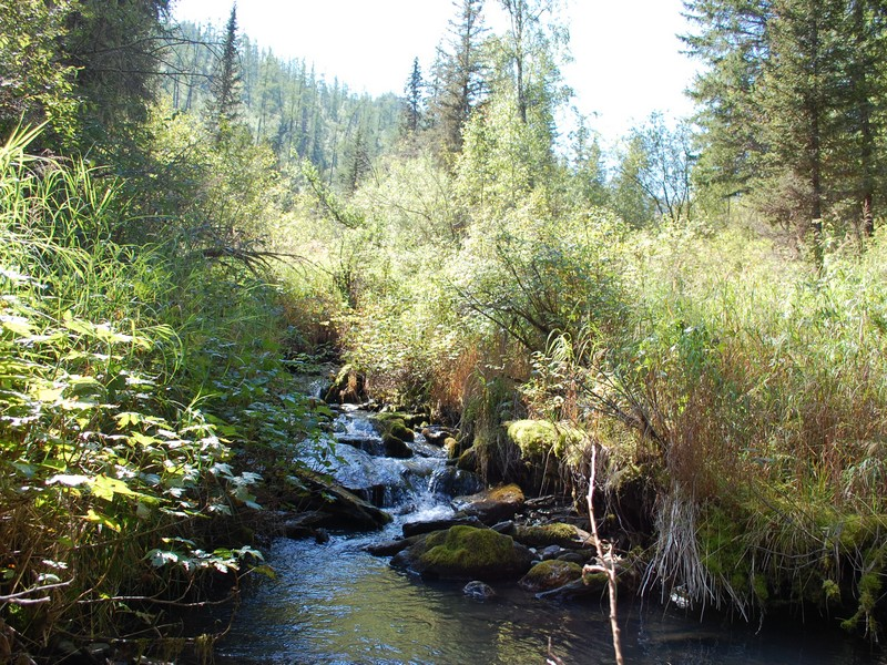 Малая речка на Алтай